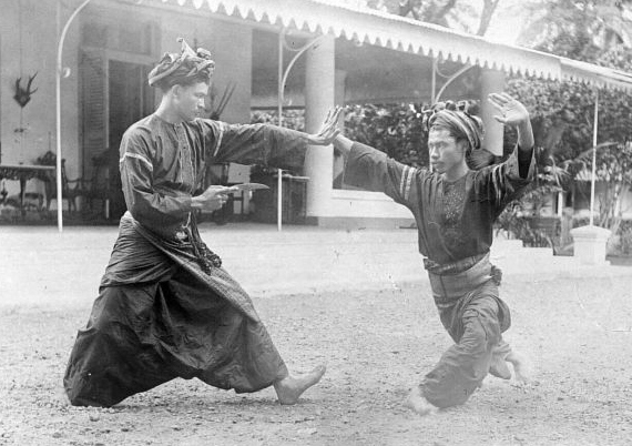 Repronegatief. Schermdansers in Fort de Kock aan de Sumatraanse westkust